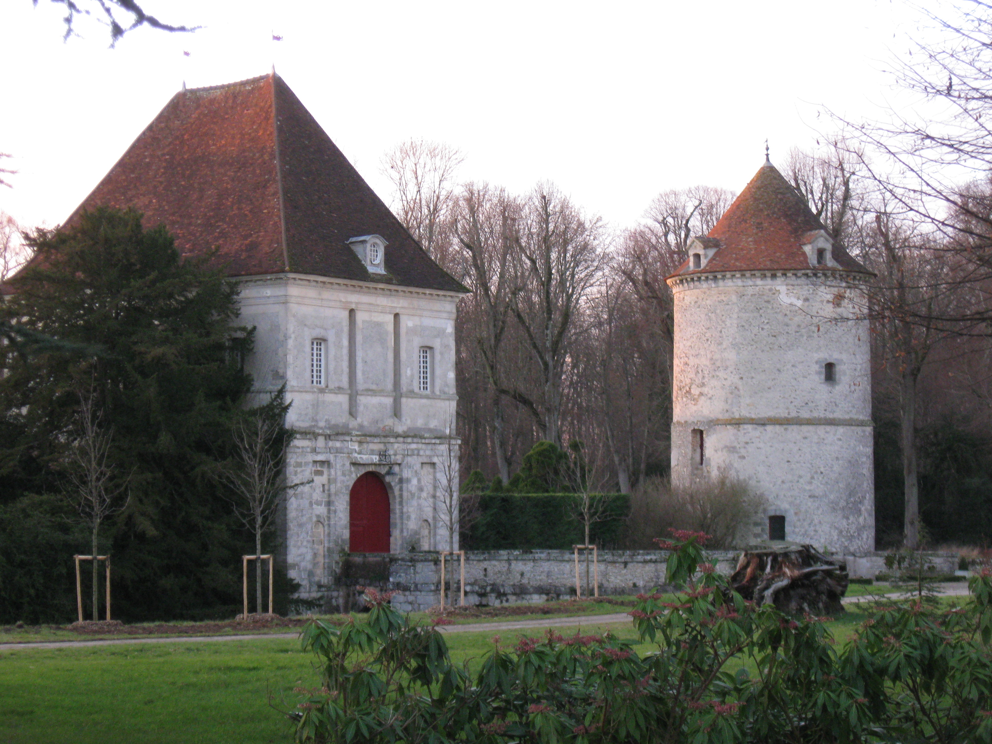 Château de La Houssaye-en-Brie (donjon et pigeonnier). (Seine-et-Marne, région Île-de-France).